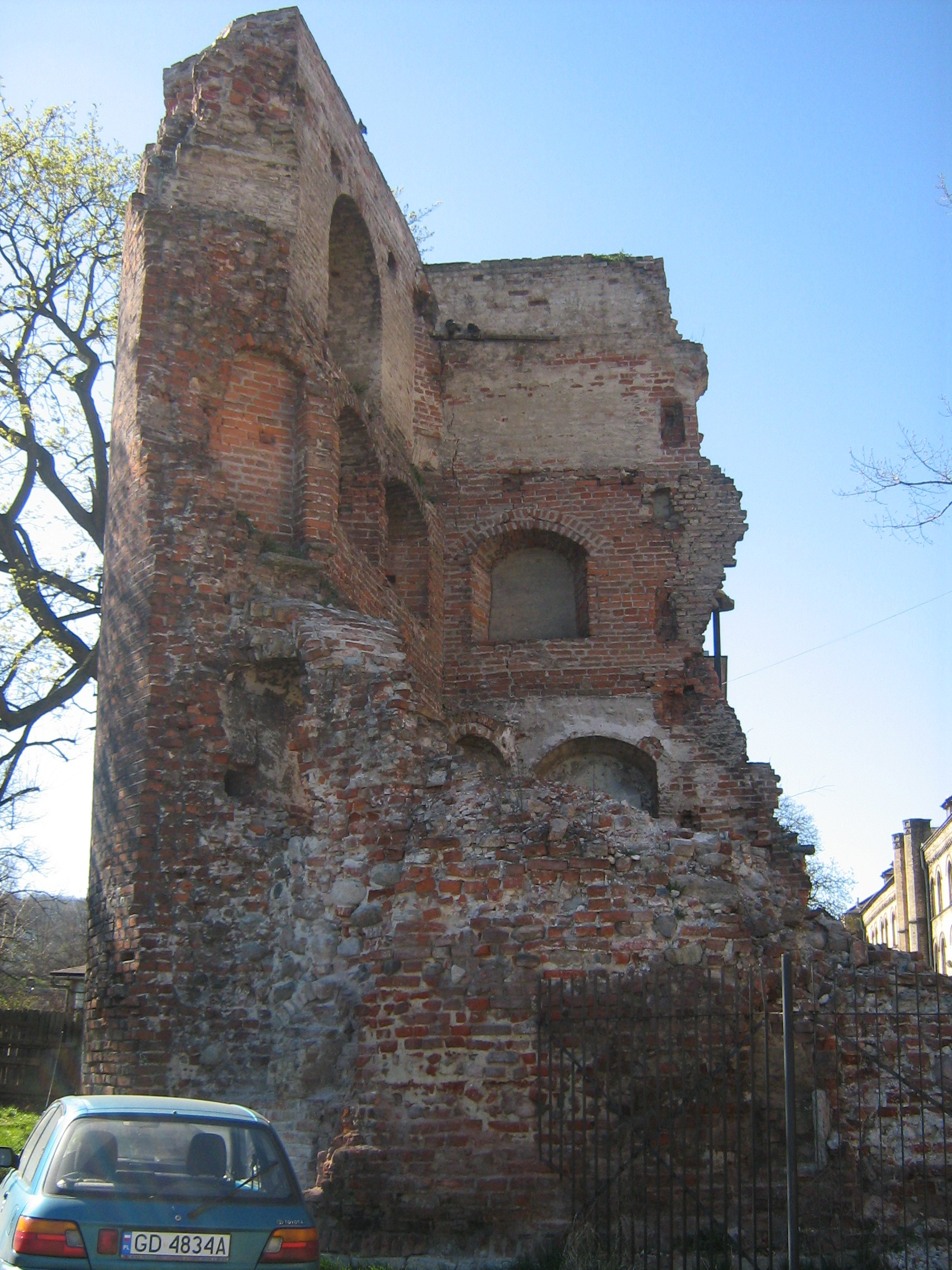 Gdańsk Stare Przedmieście, ul. Żabi Kruk - ruiny Baszty Pod Zrębem (Baszty Atutowej), XIV, XV, XVI